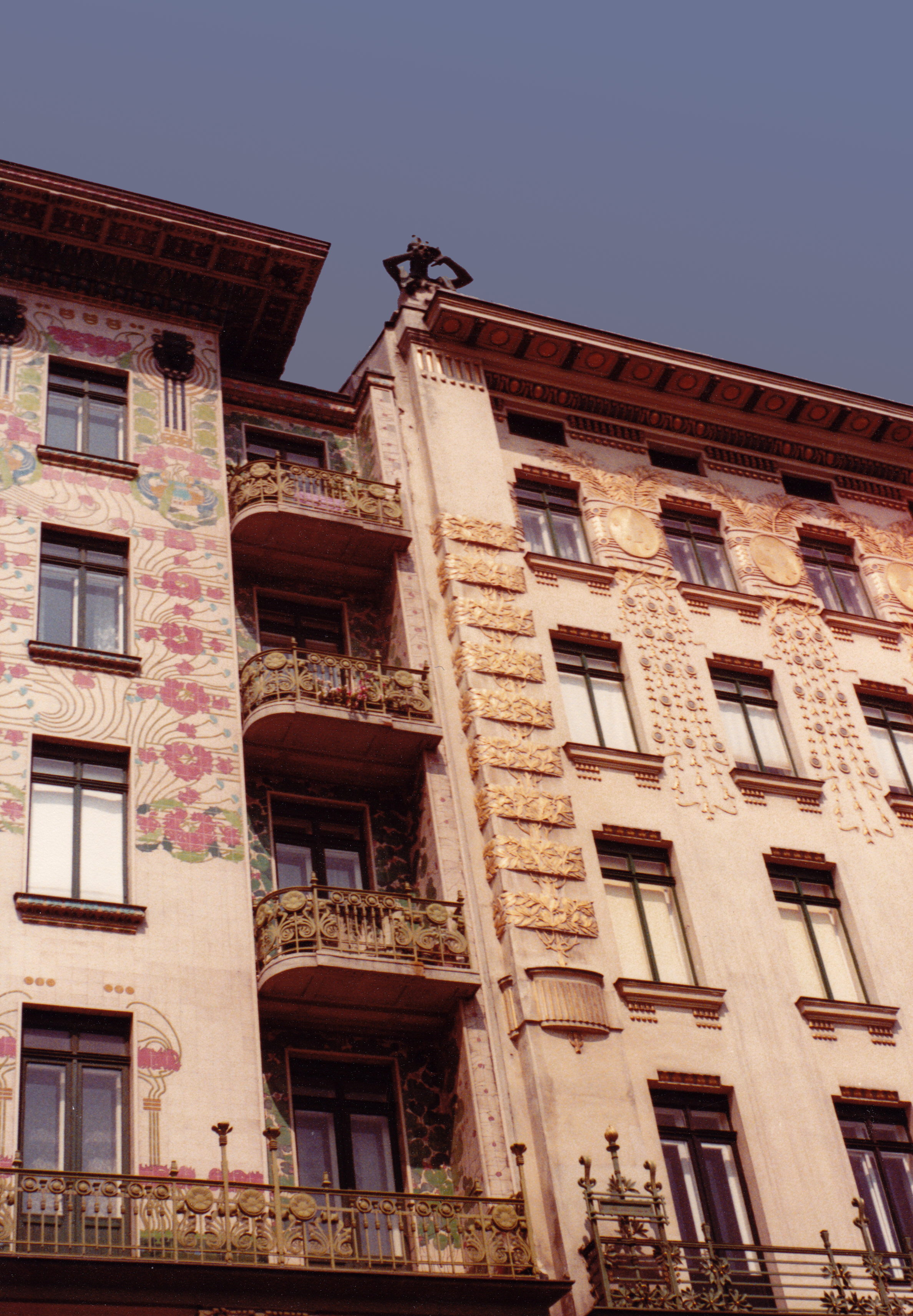 Autriche - Vienne - Linke Wienzeile 40 - Maison aux majoliques (architecte Otto Wagner)